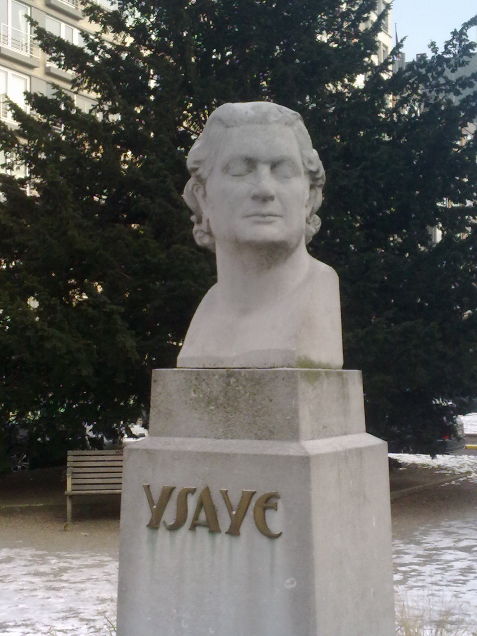 Buste du musicien Eugène Ysaÿe à Liège par Louis Dupont (jardin du boulevard Piercot)